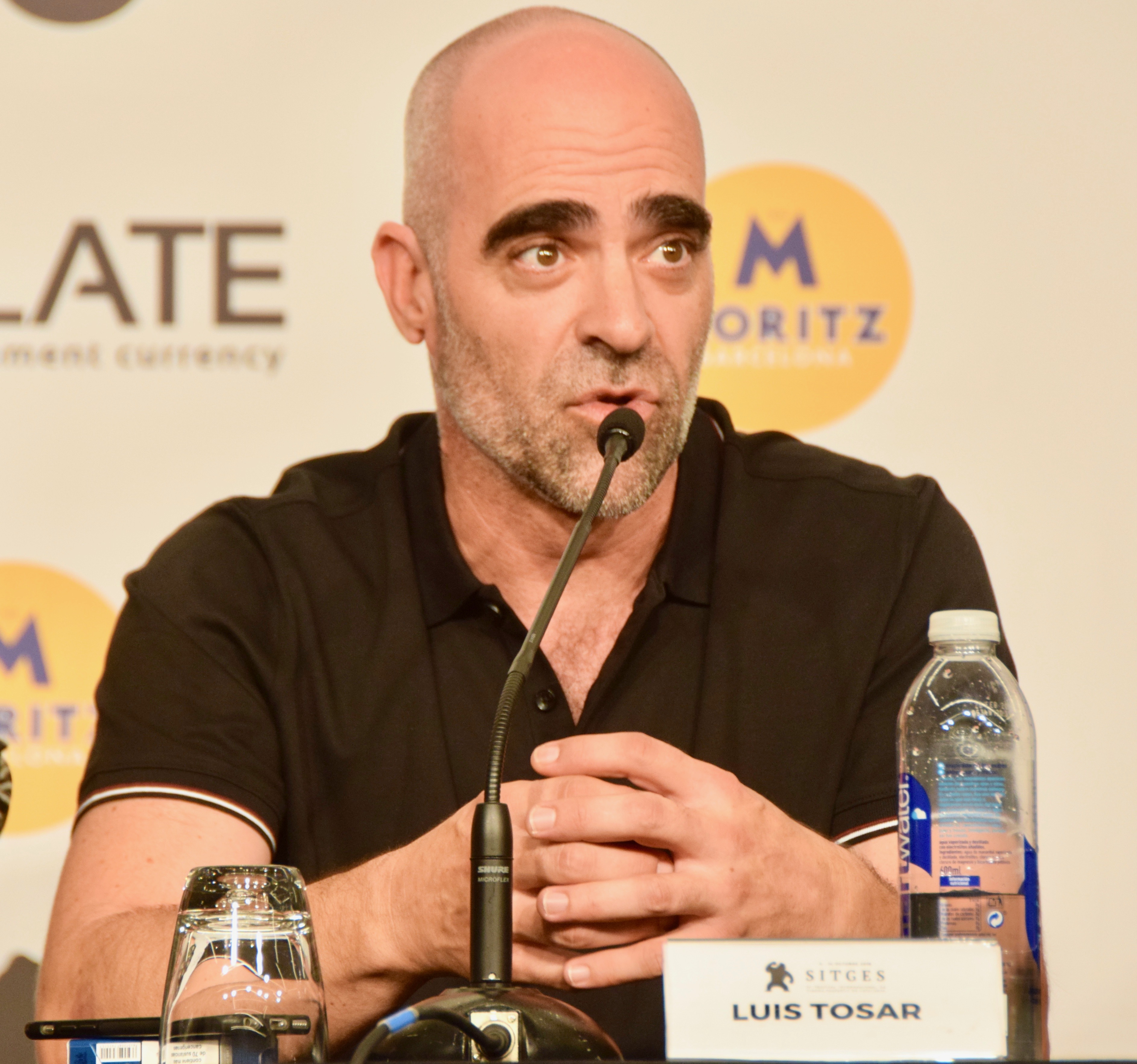 Festival de cinema de Sitges 2018